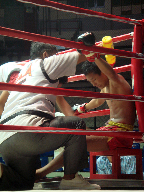 Thai Boxing at Ratchadamnoen Boxing StadiumThai Boxing at Ratchadamnoen Boxing Stadium